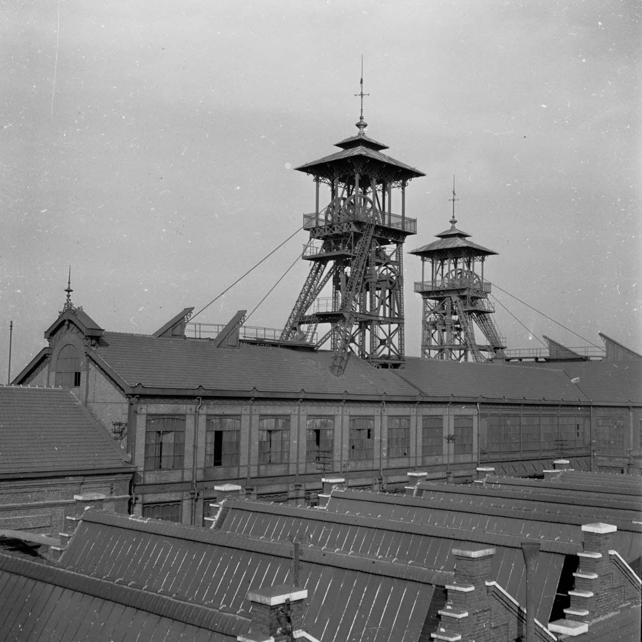 La fosse Ledoux de la Compagnie des mines d'Anzin était un charbonnage constitué de deux puits situé à Condé-sur-l'Escaut, Nord, Nord-Pas-de-Calais, France.